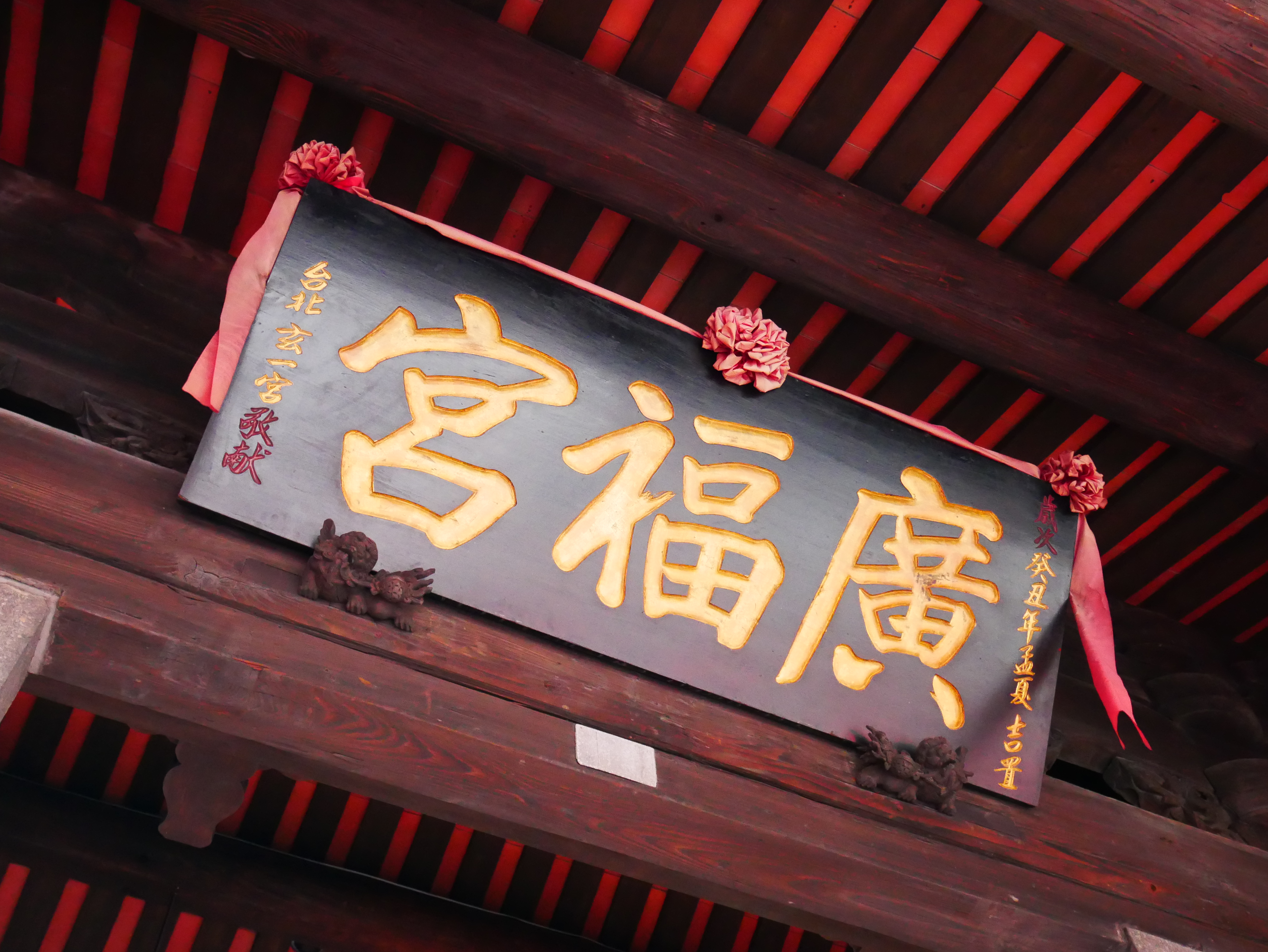 中文（台灣）: 新莊廣福宮廟名匾，台北玄一宮敬獻。